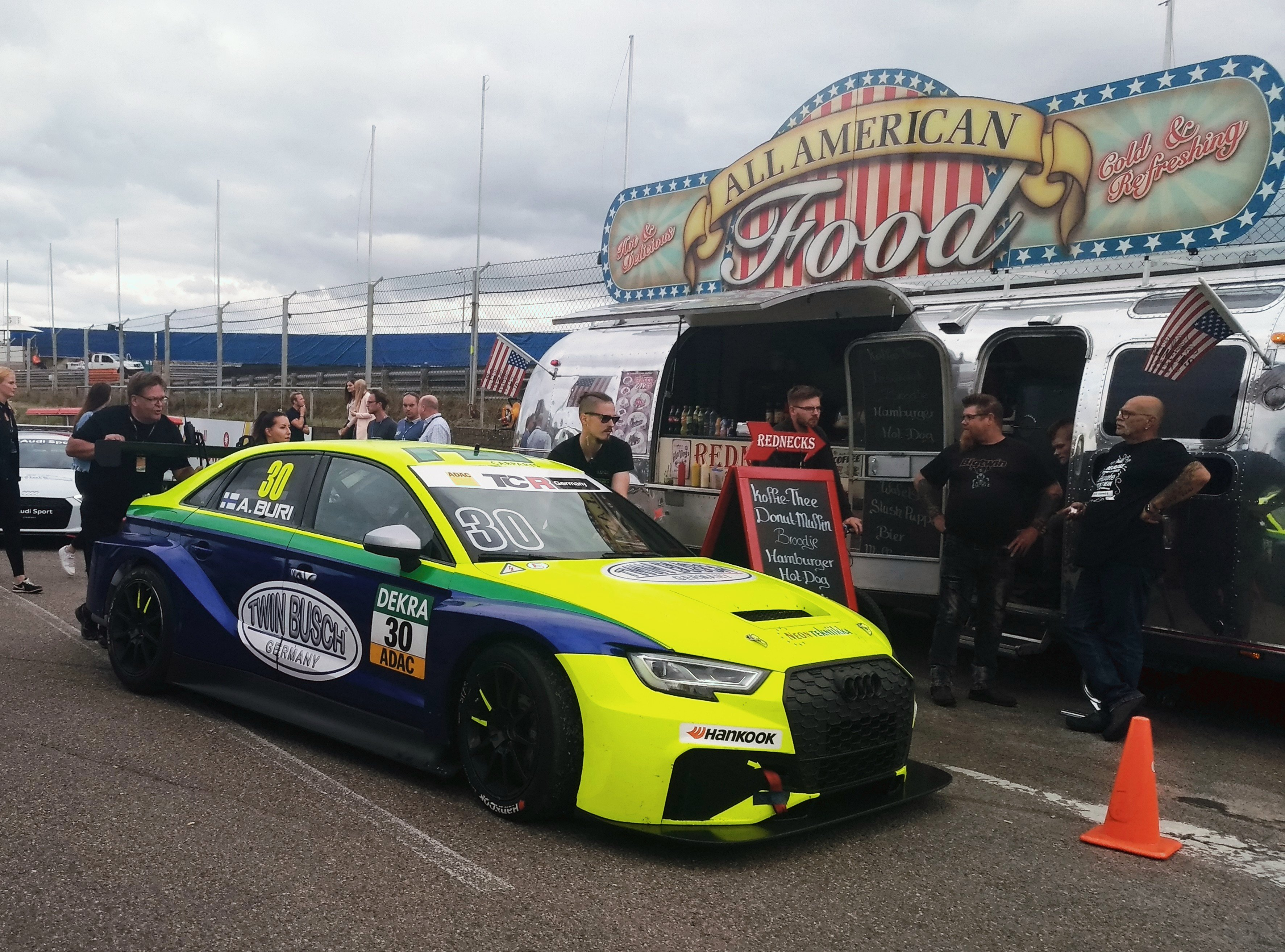 Audi RS3 LMS TCR (Antti Buri)